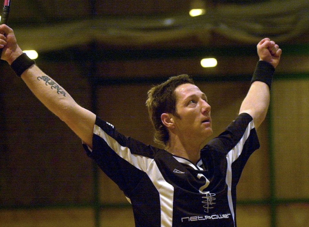 Jørgen Mikkelsen scorer i frøyhallen